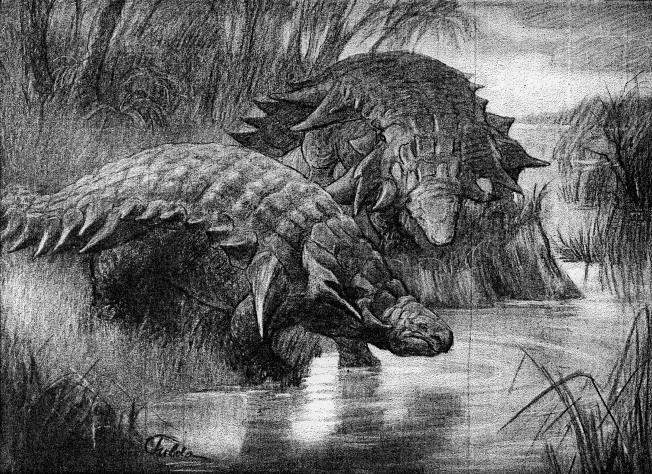 Edmontonia